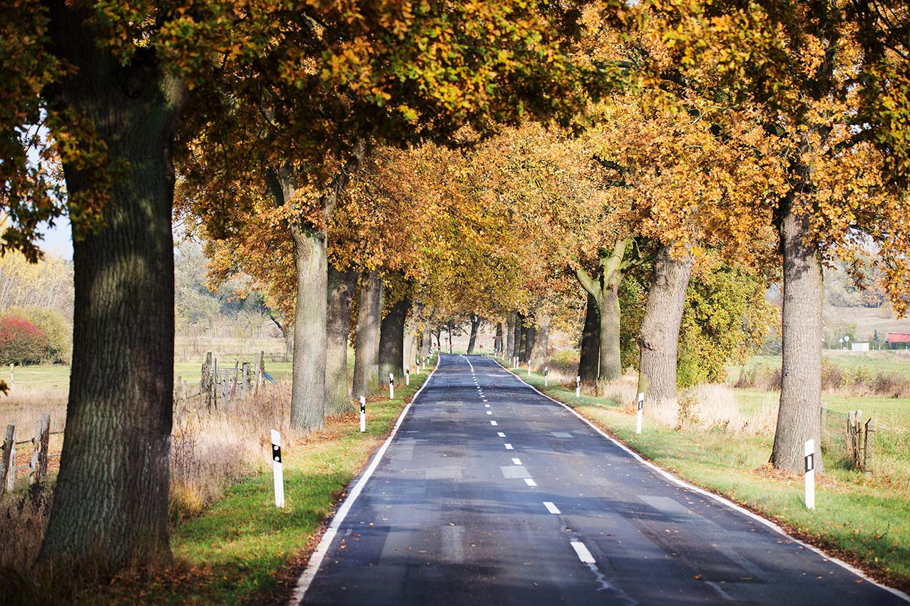 Alte Eichenallee bei Neukrug (Wredenhagen) in Mecklenburg